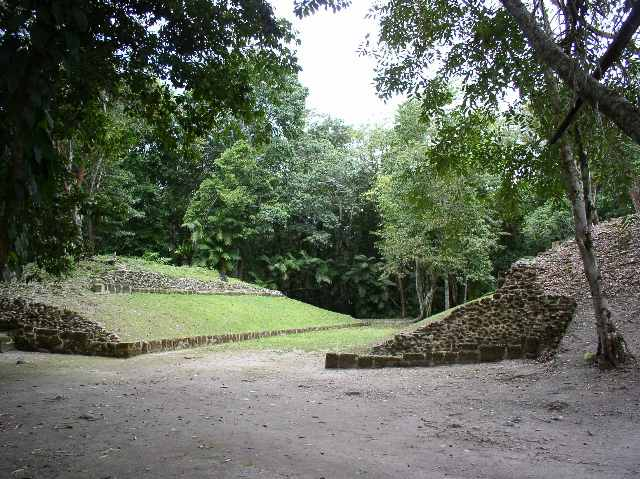 Ball court in Xunantunich, a maya site in Belize